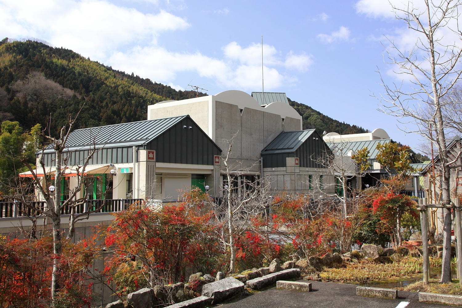 百年草（豊田市足助町、2012年）